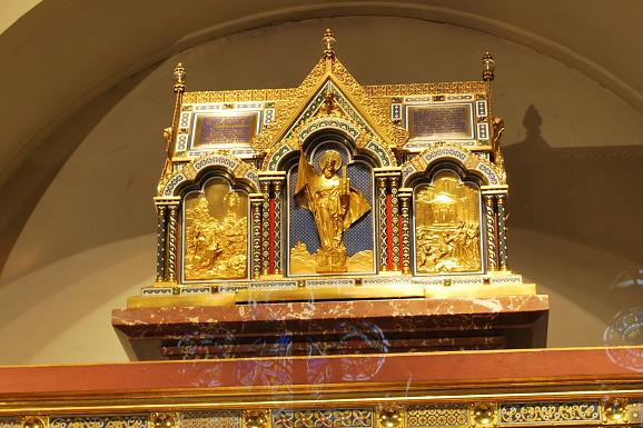 Schrein des Hl. Leopold